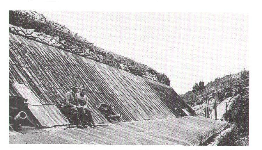 Fort Garda Mittelbatterie